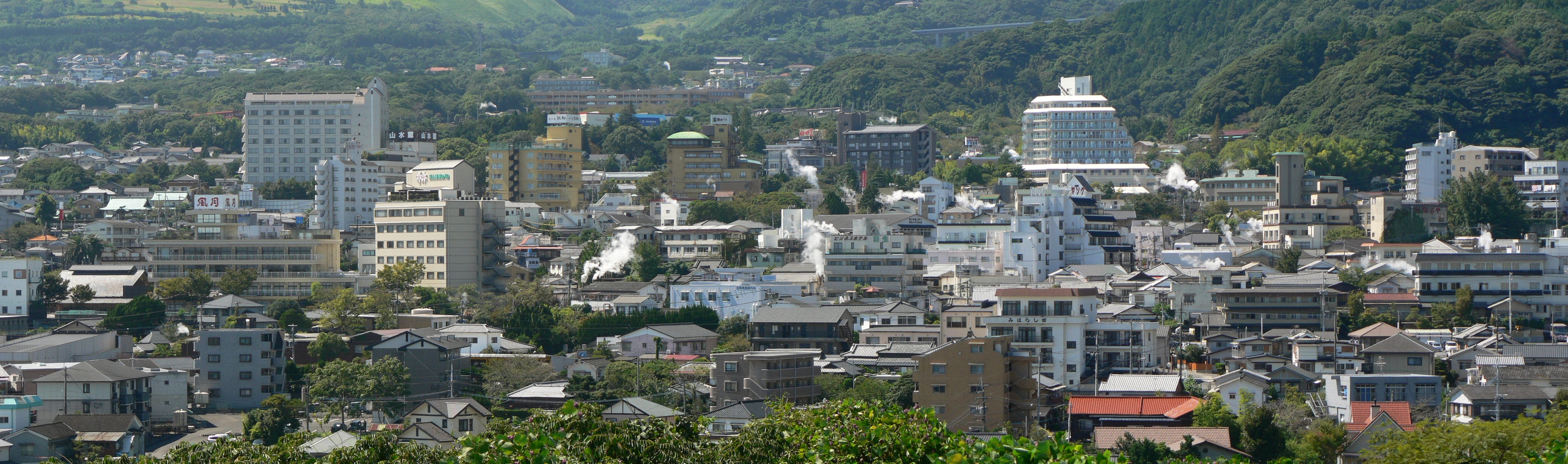 別府八湯のひとつ、鉄輪(かんなわ)温泉の温泉街。